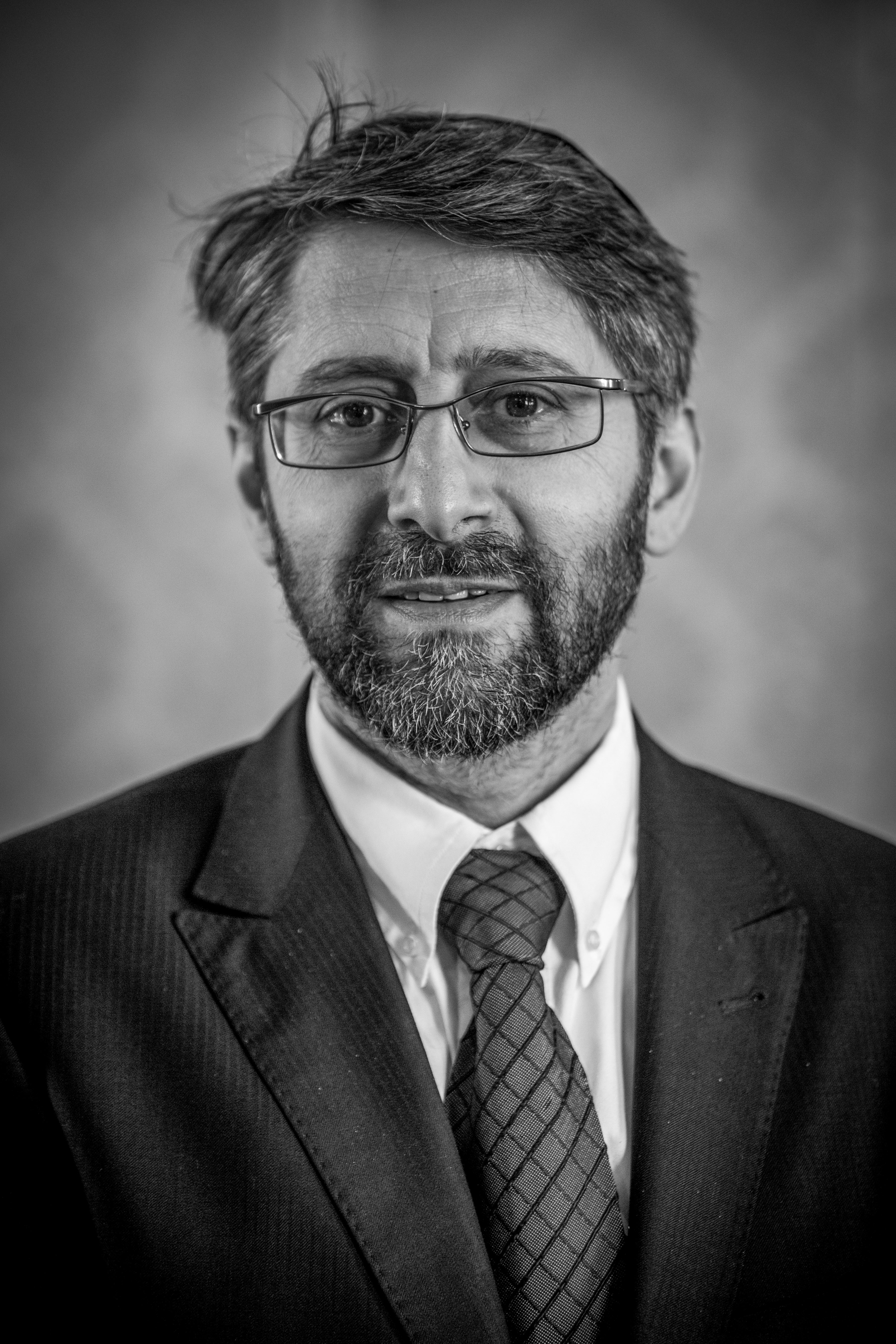 Haïm Korsia, né le 27 septembre 1963 à Lyon, est un rabbin français, aumônier en chef du culte israélite des armées et de l'École polytechnique, administrateur du Souvenir français et ancien membre du Comité consultatif national d'éthique. Le 22 juin 2014, il est élu grand-rabbin de France pour sept ans.